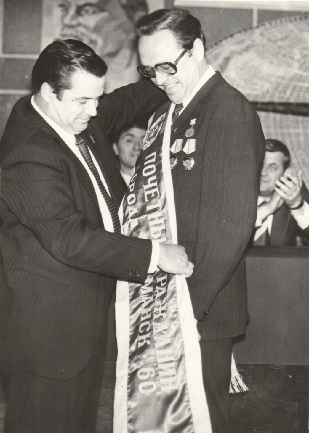 Награждение званием "Почетный гражданин"